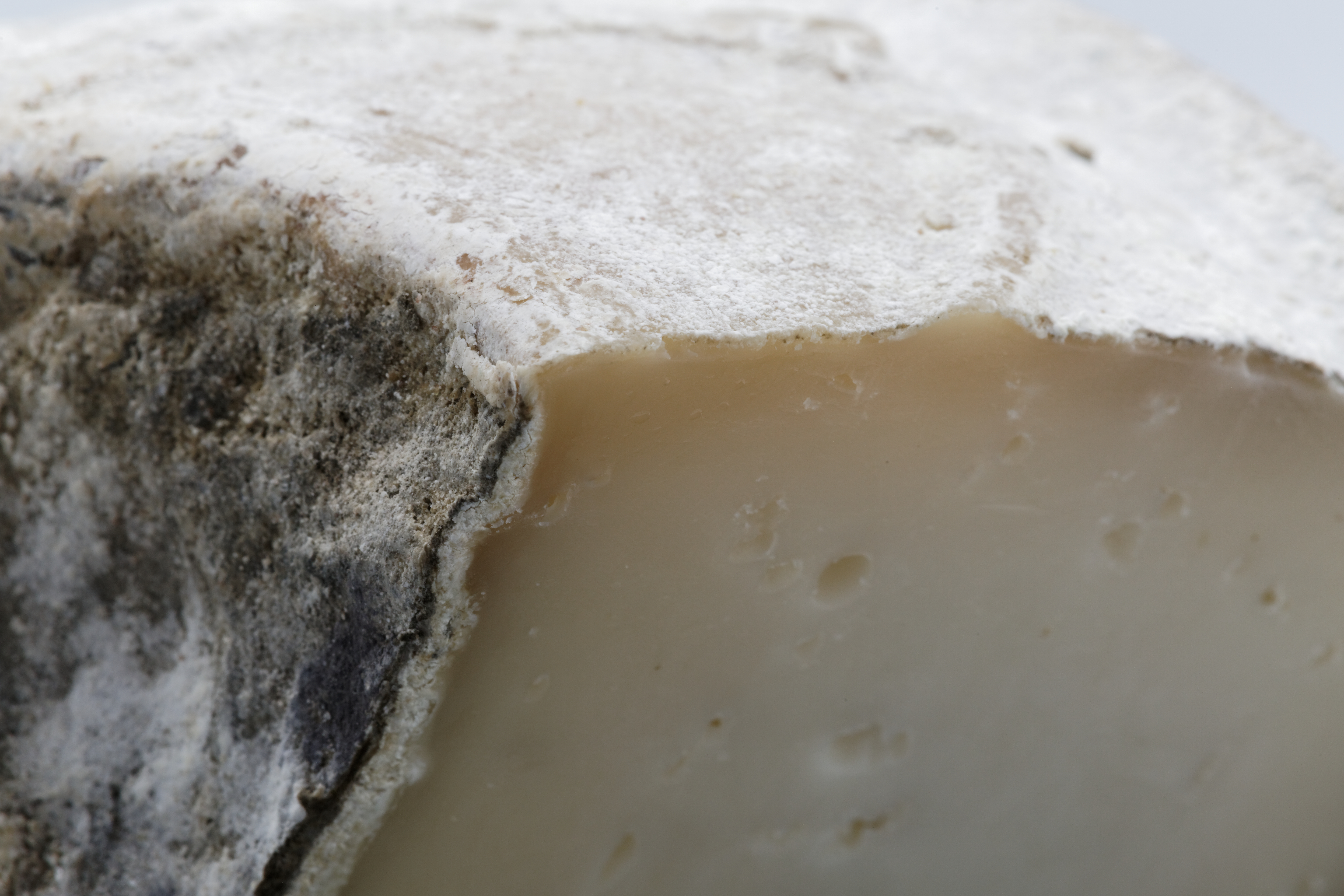 Le Troncho de Mayo, fromage espagnol de brebis au lait cru.